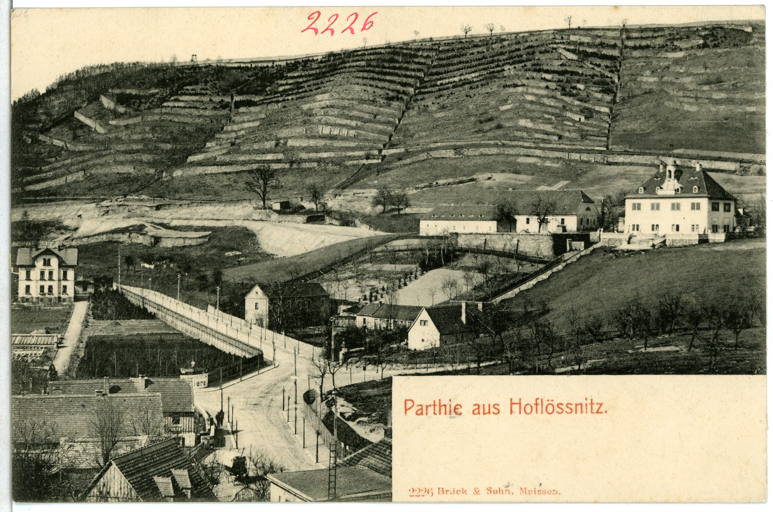 Oberlößnitz; Höflößnitz This postcard is from publisher Brück & Sohn in Meißen ( postcard has a unique number 02226 and is available in a higher resolution at the publisher. This images was uploaded in a cooperation project between Wikipedians and the publisher.